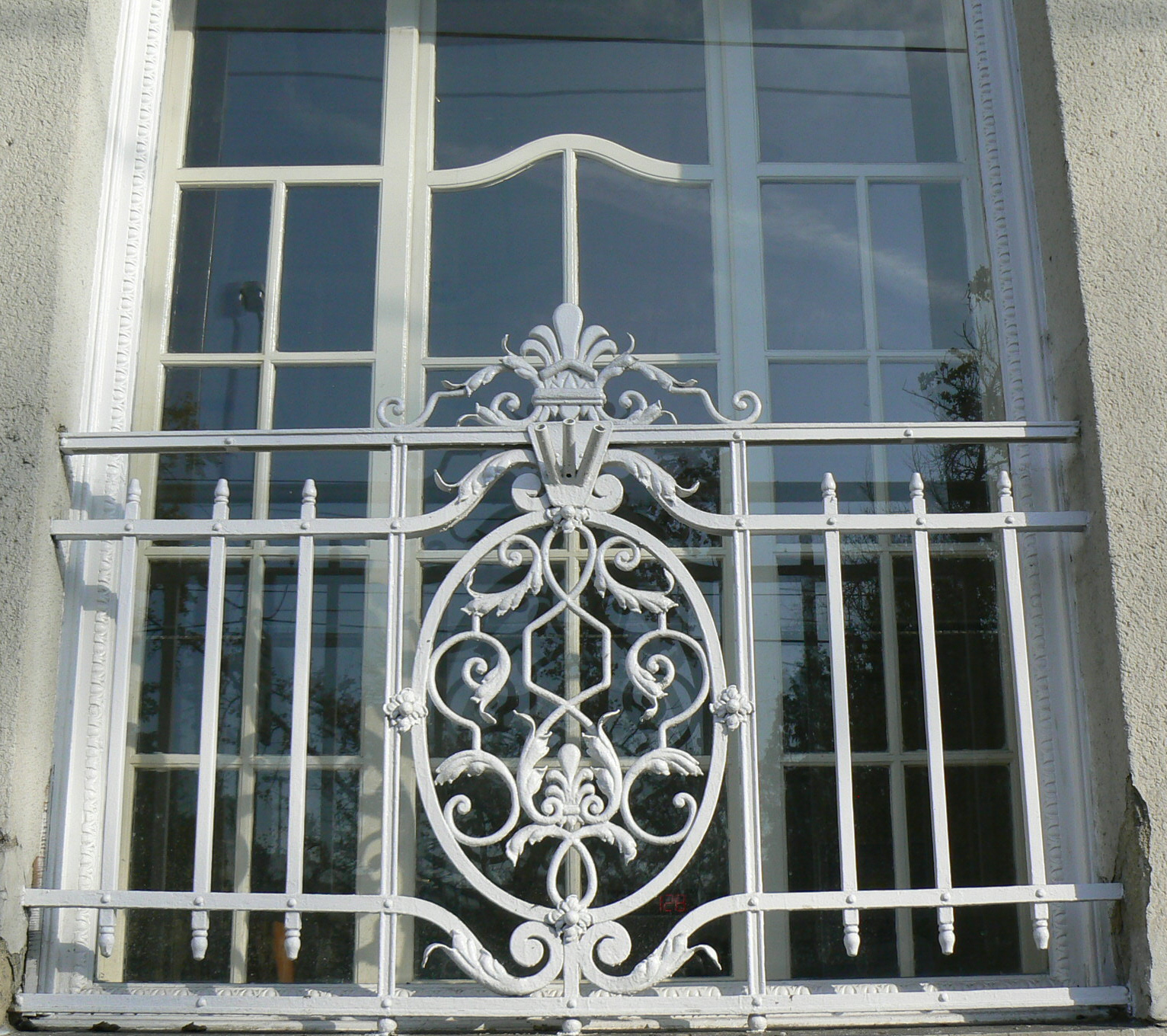 A volt Szeged-Csongrádi Takarék székházának ablakrácsa, Szeged, Széchenyi tér 7. szám alatt.